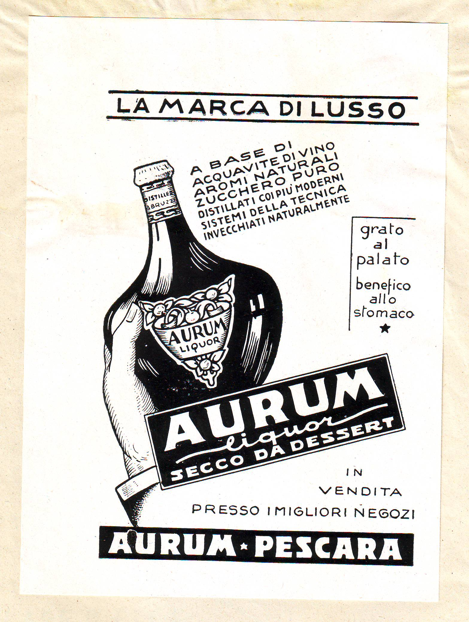 Manifesto pubblicitario del liquore prodotto dalla distilleria Aurum di Pescara, sec. XX (AS Pescara, Archivio storico Comune di Pescara, cat. X commissioni edilizie, b. 22, fasc. 3, sottofasc. 7)